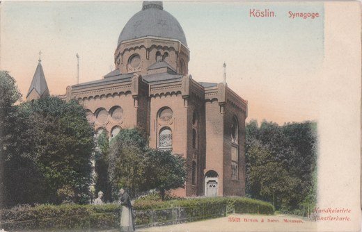 Ansichtskarte mit der Synagoge (1938 zerstört) in Köslin (nach 1945 umbenannt in Koszalin)